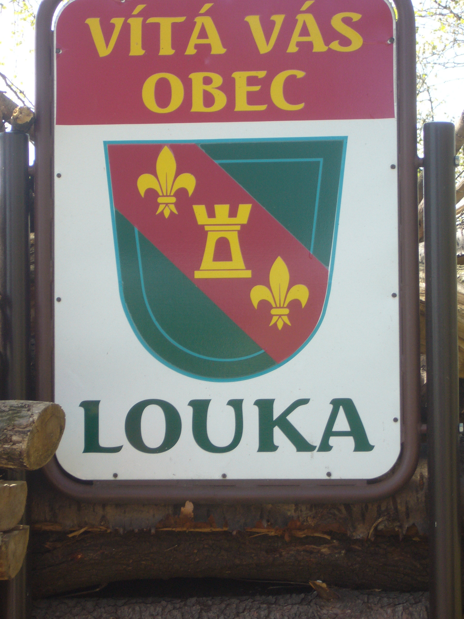 Tabule se znakem obce, které jsou umístěny u silnic při vjezdu do obce Louka v okrese Hodonín.